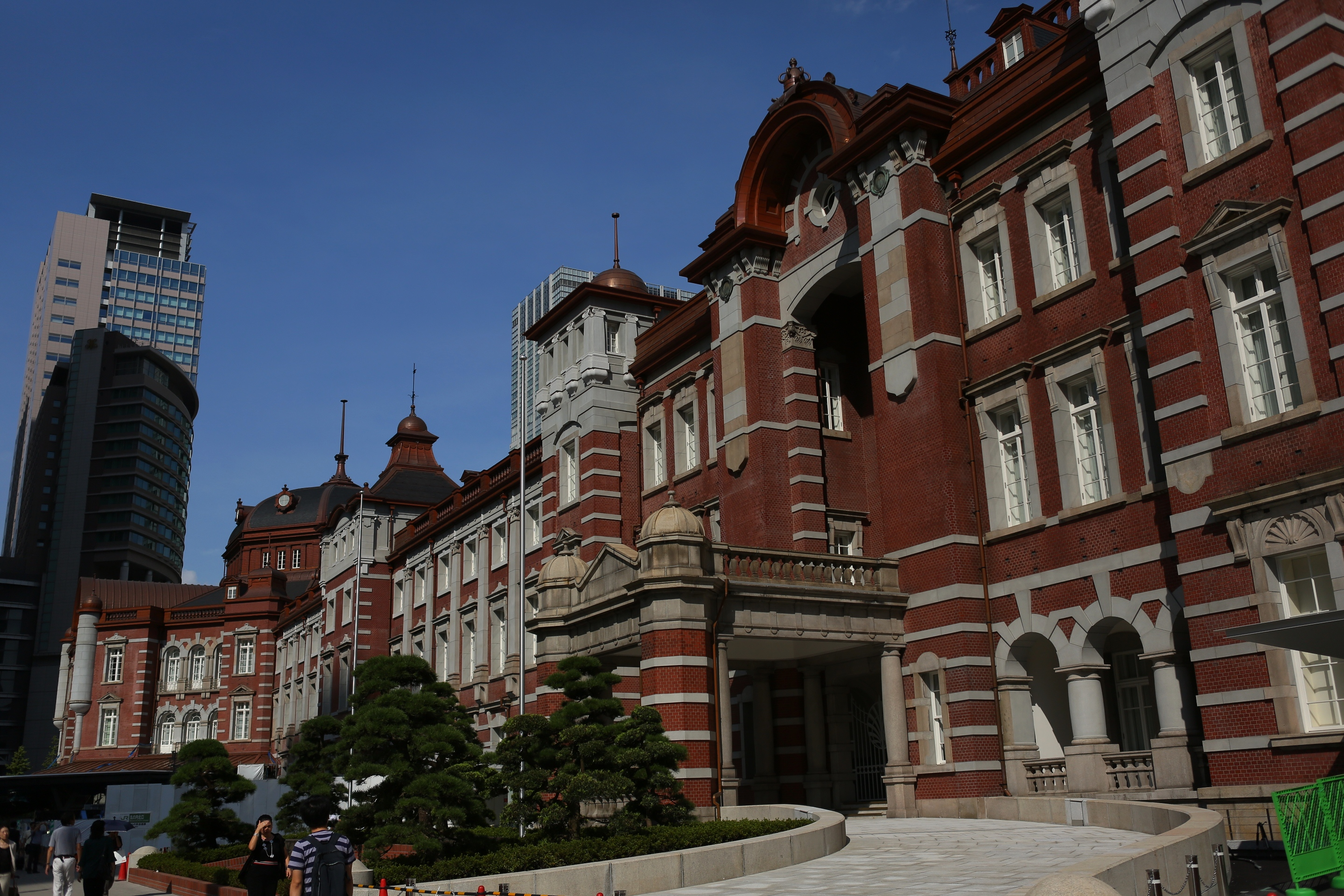 東京駅丸の内駅舎。皇族用出入り口近くより北側を望む。